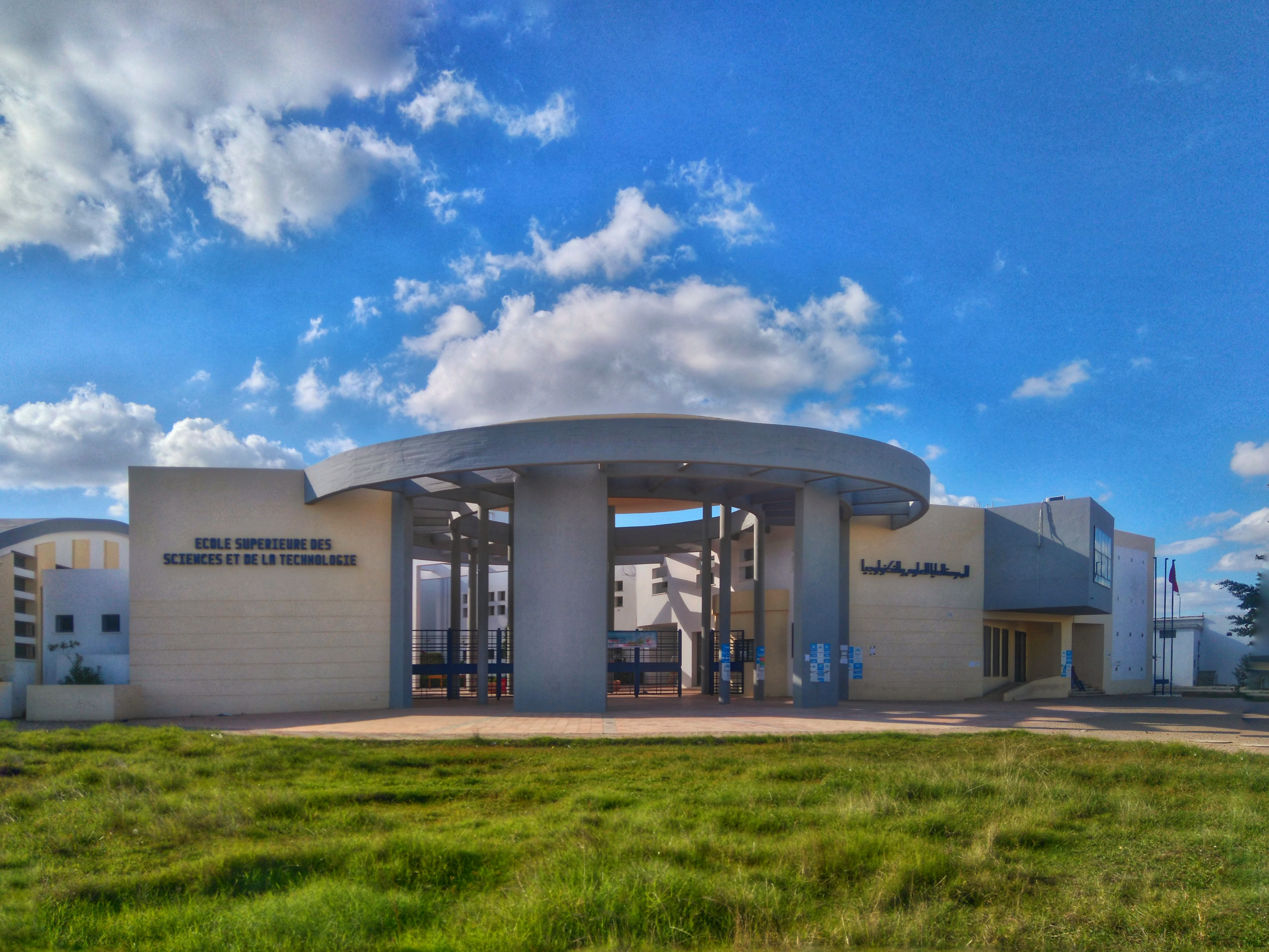 Façade principale de l'École supérieure des sciences et de la technologie d'Hammam Sousse, Tunisie